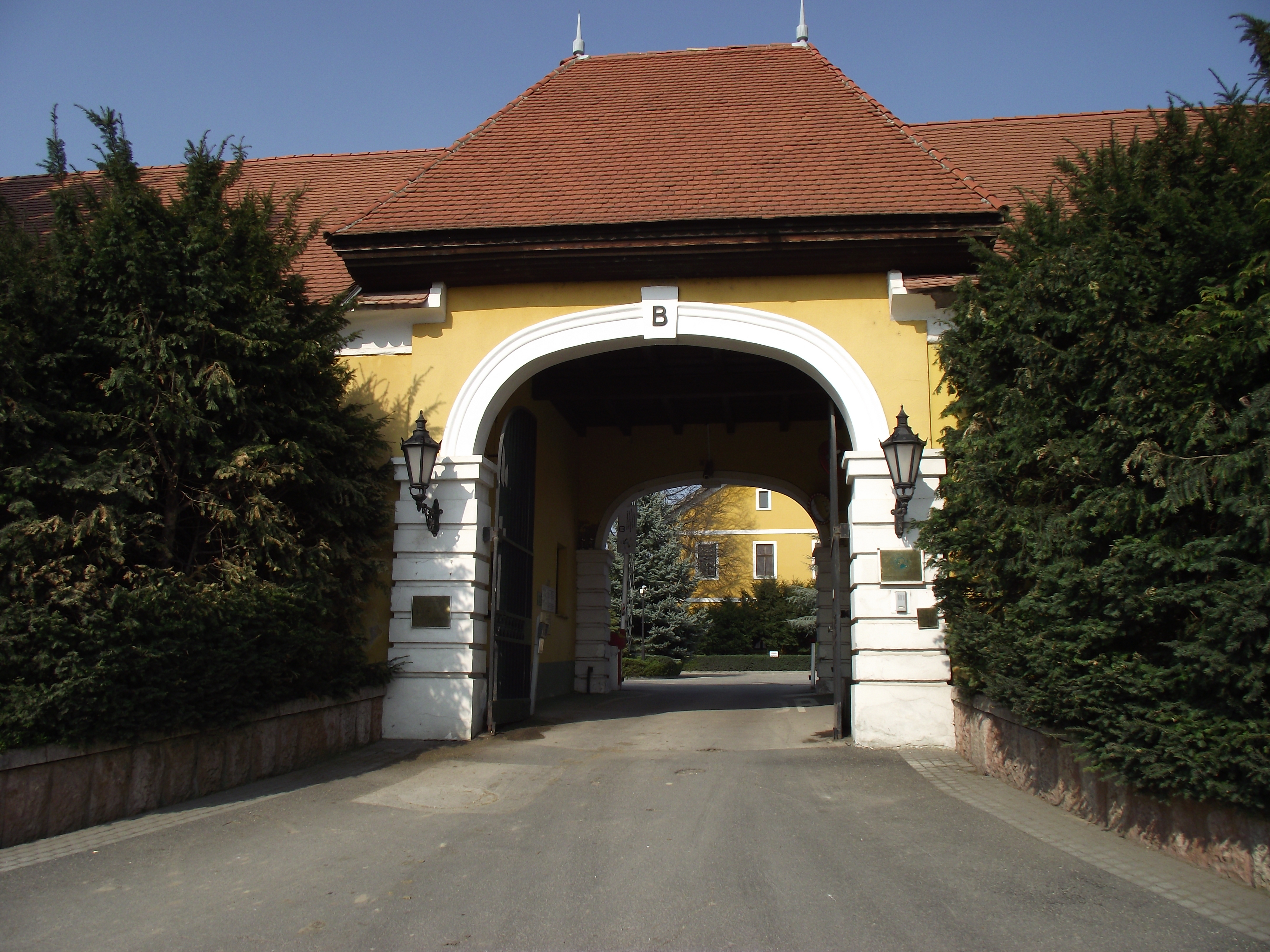 Bábolna - A bábolnai ménesbirtok bejárata